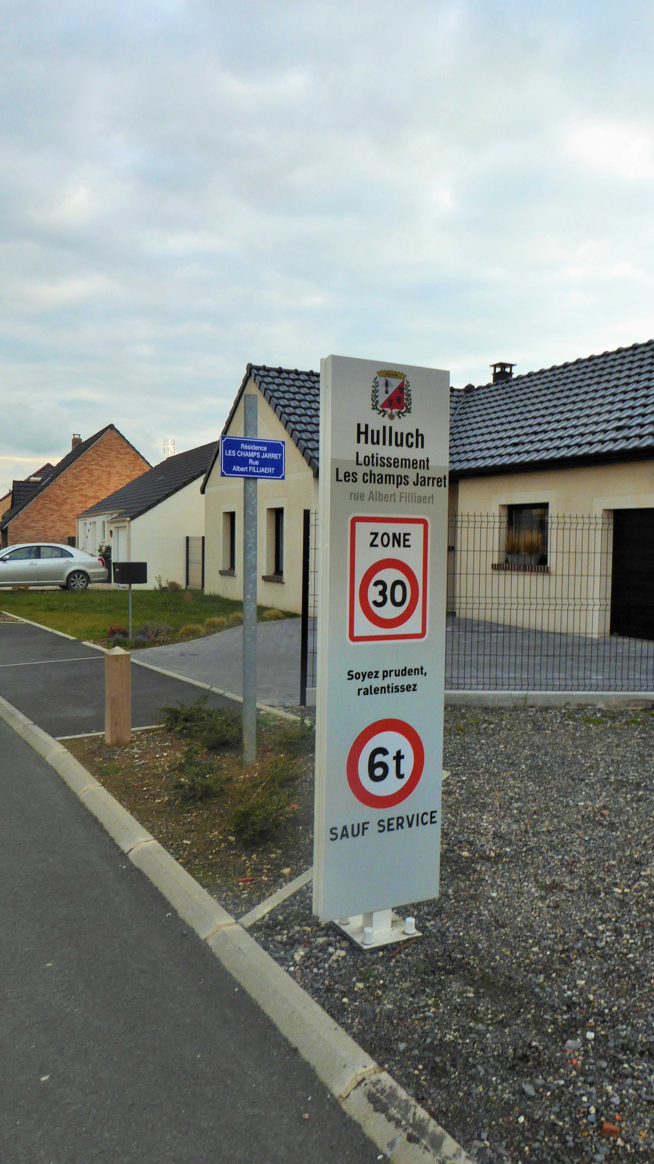 Lotyissement des "champs Jarret" à Hulluch , Pas-de-Calais, Nord-Pas-de-Calais-Picardie France.